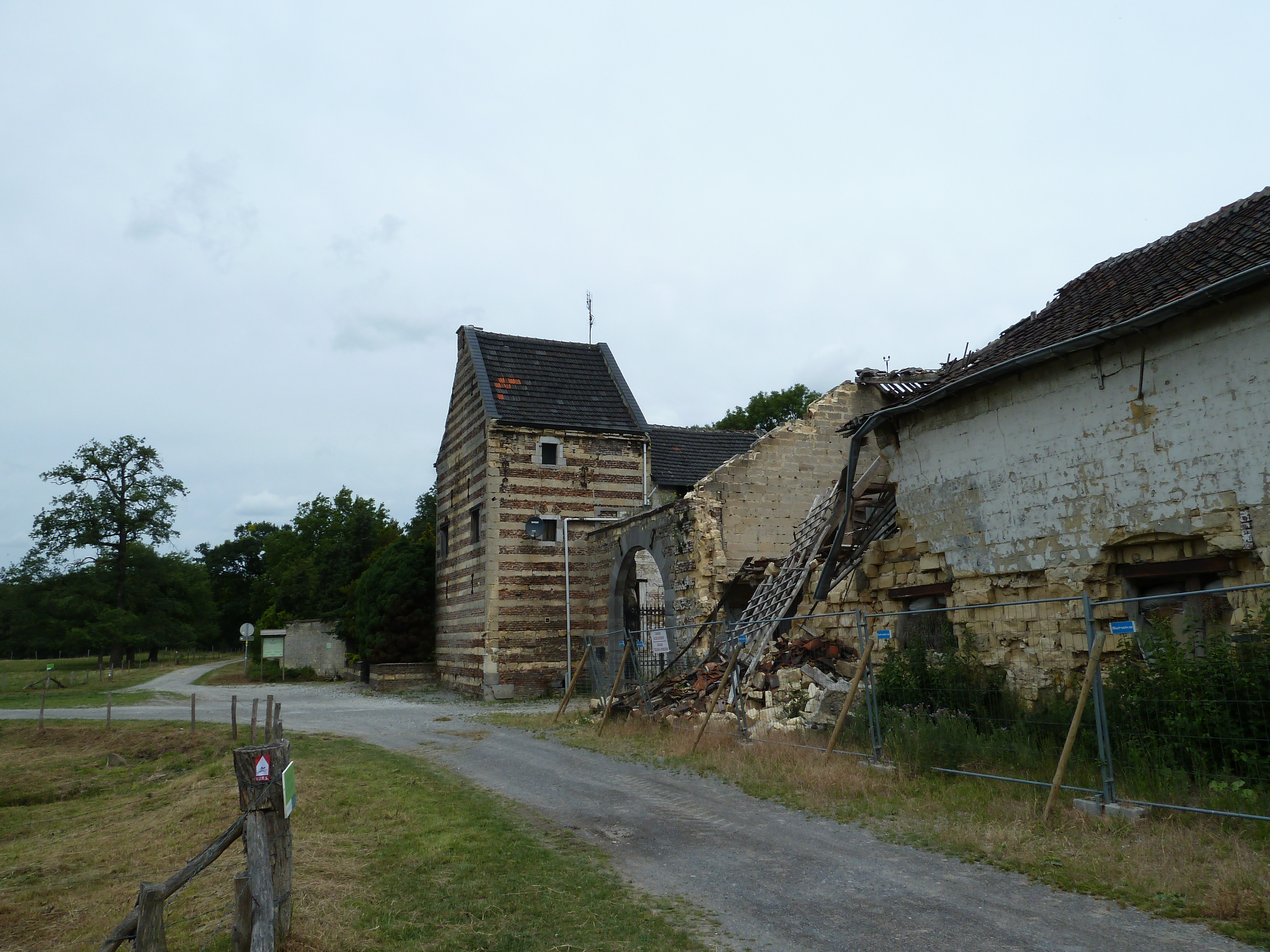 Caestert, Visé, Belgique